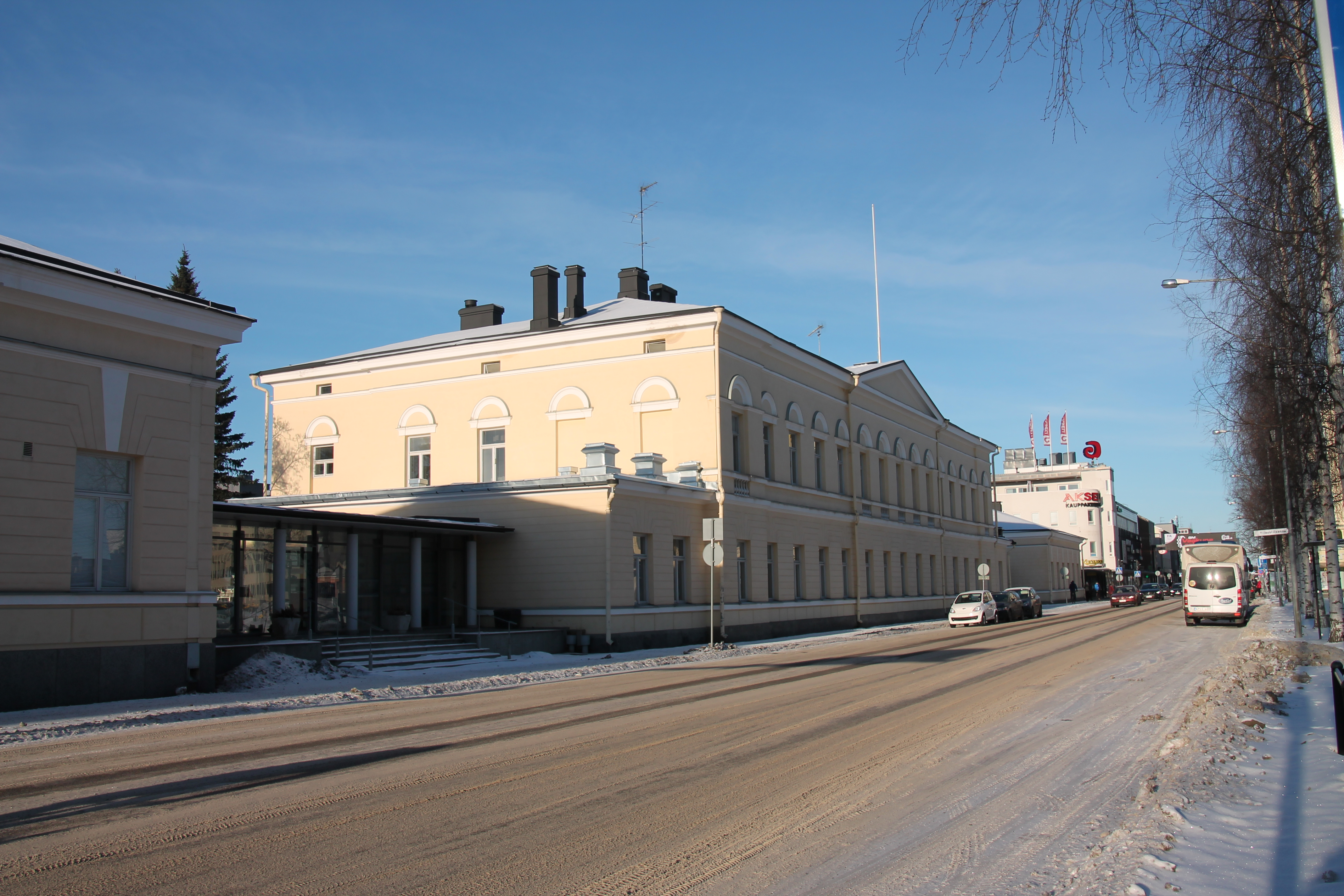 Näkymä Maaherrankadulle Raatihuoneen eteen.